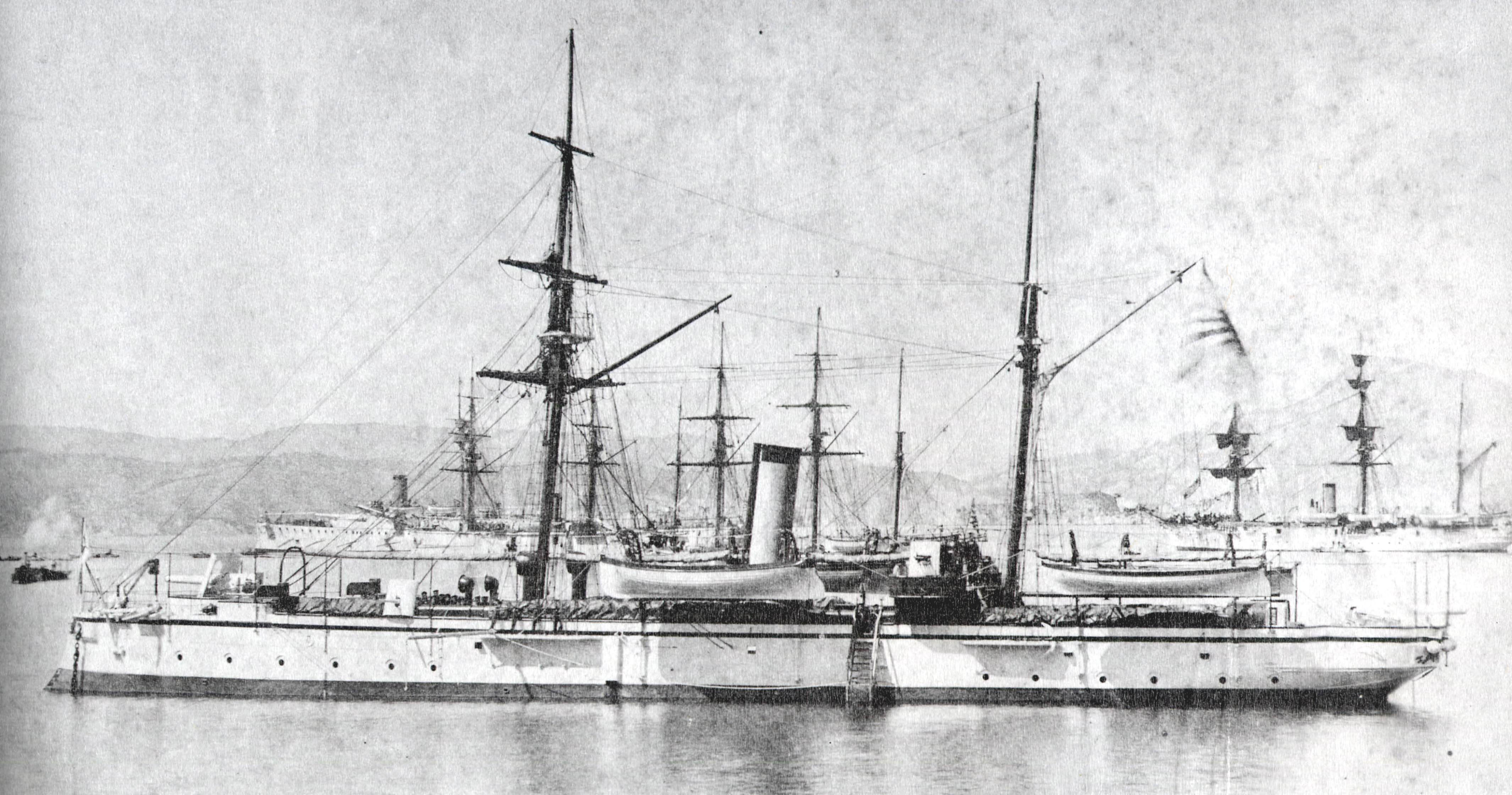 日本海軍砲艦摩耶型「摩耶」 呉軍港内に停泊中の写真。